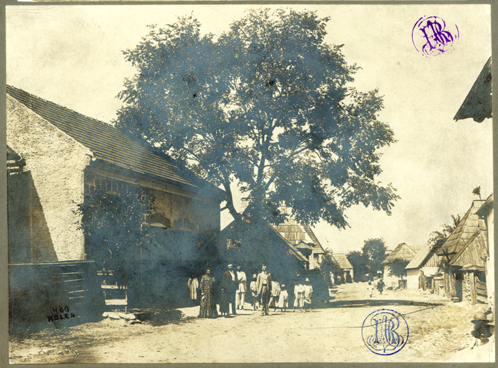 Adler - Stradă din Băieşti